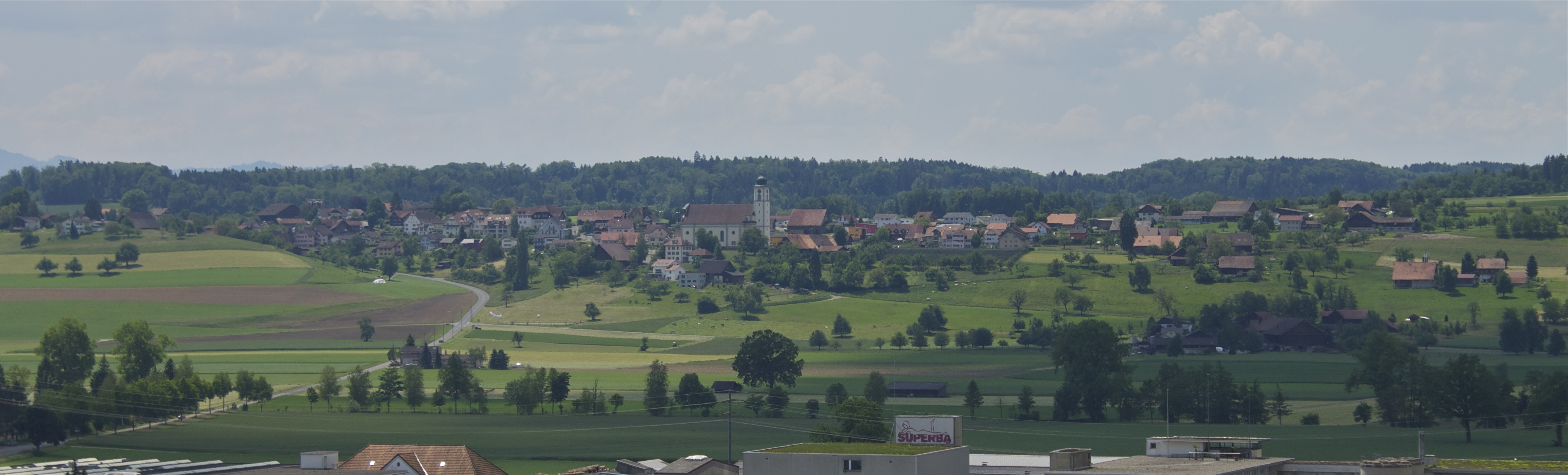 Knutwil von Büron aus gesehen.